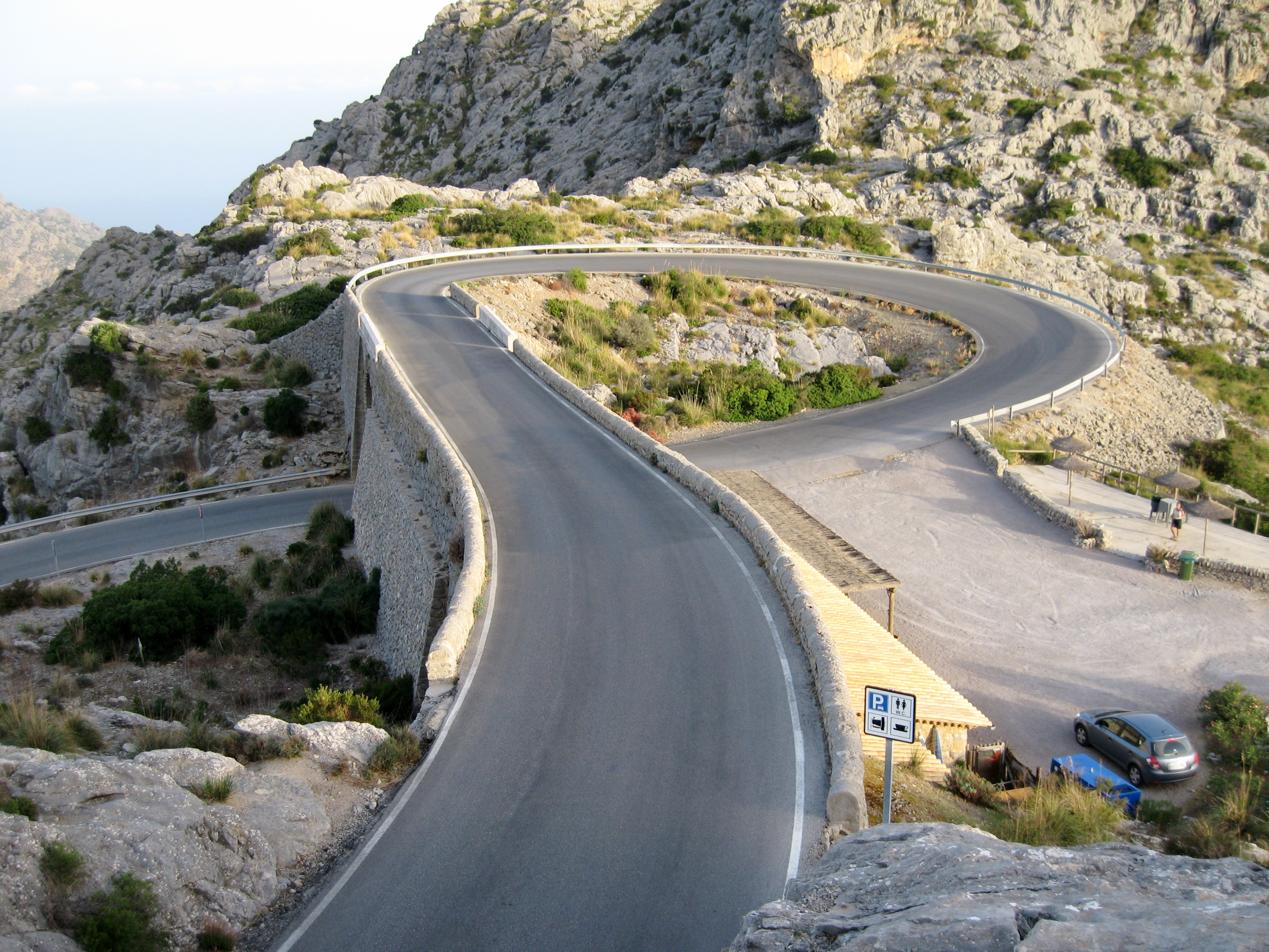 Nus de sa Corbata („Krawattenknoten“), Gemeinde Escorca, Mallorca, Spanien